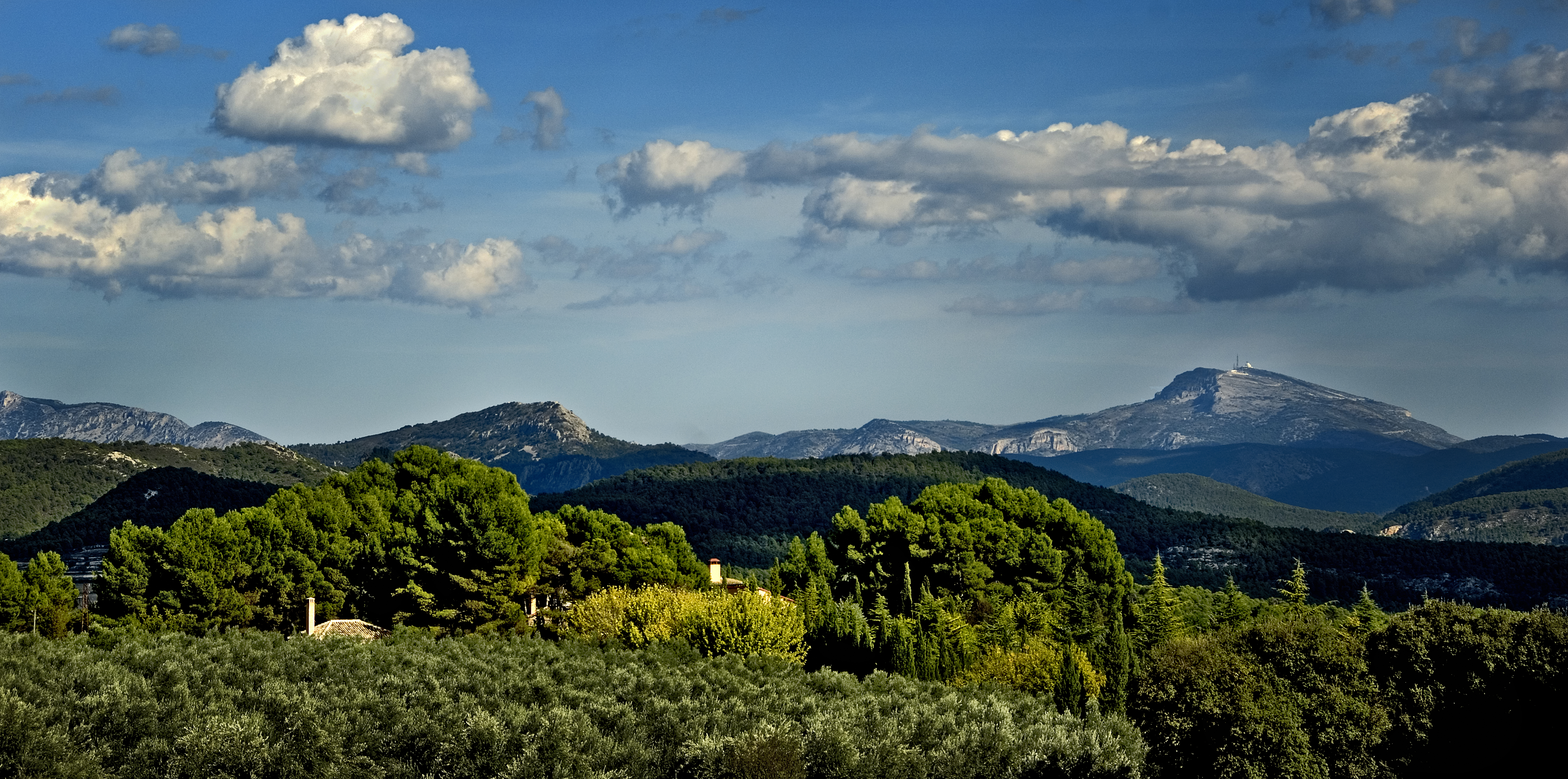 Parque Natural de Font Roja.